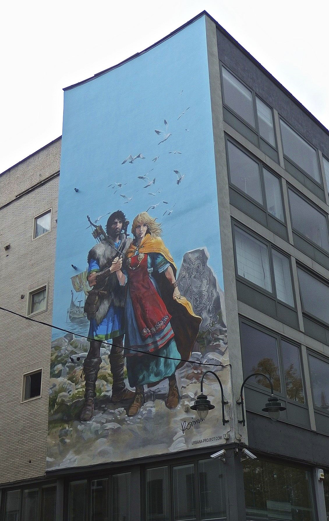 Stripmuur Thorgal en Aaricia te Brussel.